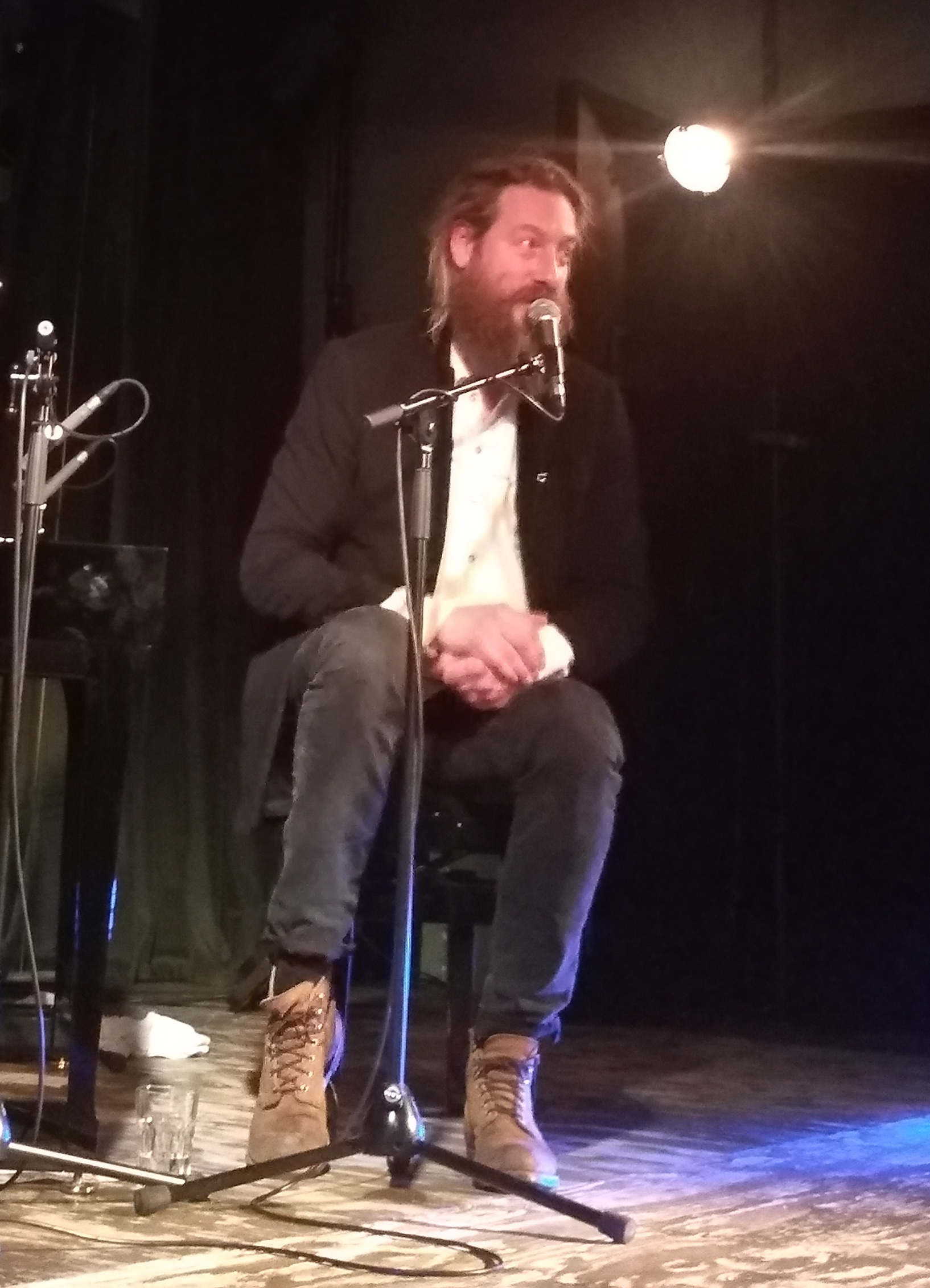 Joep Beving, Concert, Grüner Salon, Volksbühne, Berlin, Germany